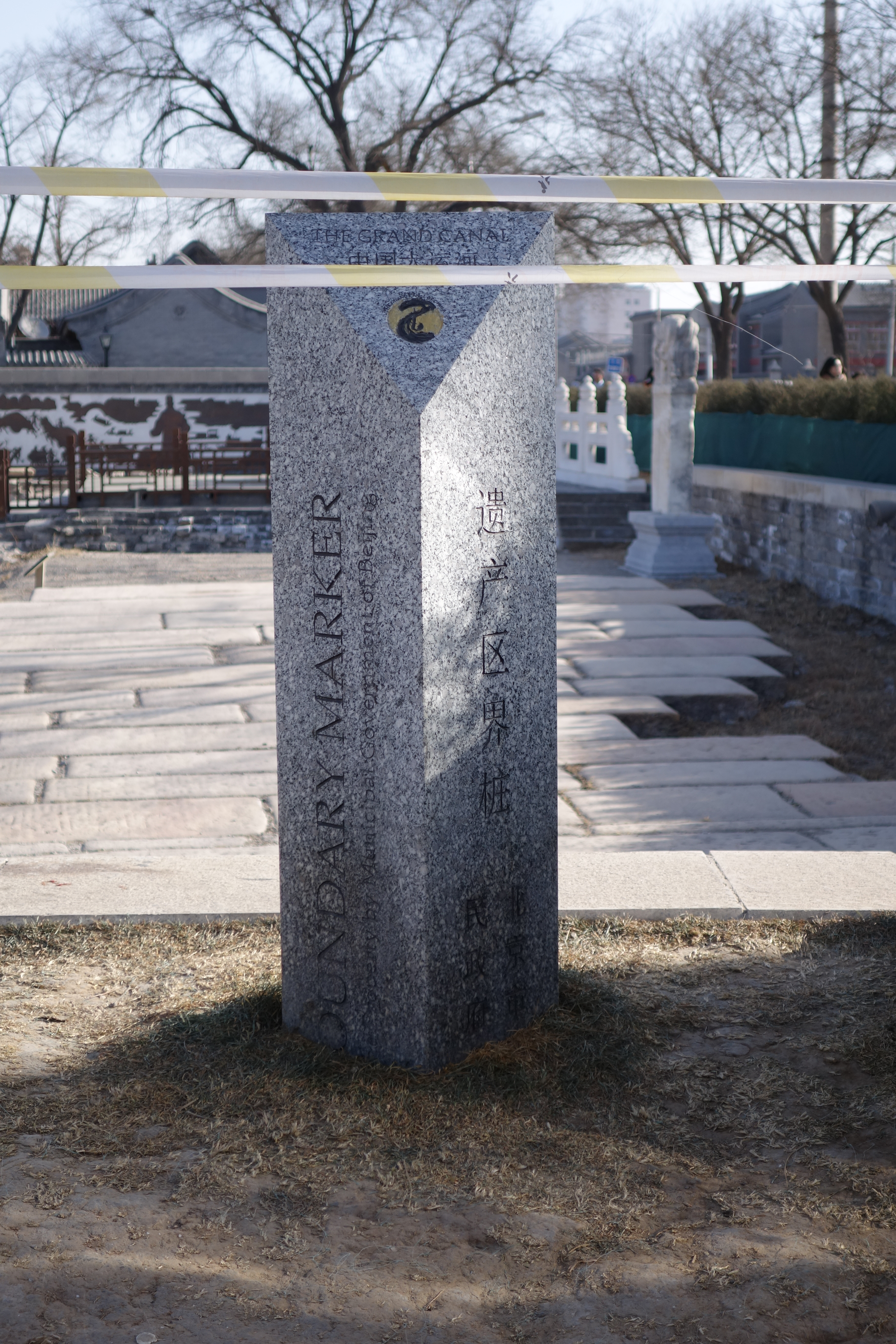 玉河故道大运河遗迹保护碑